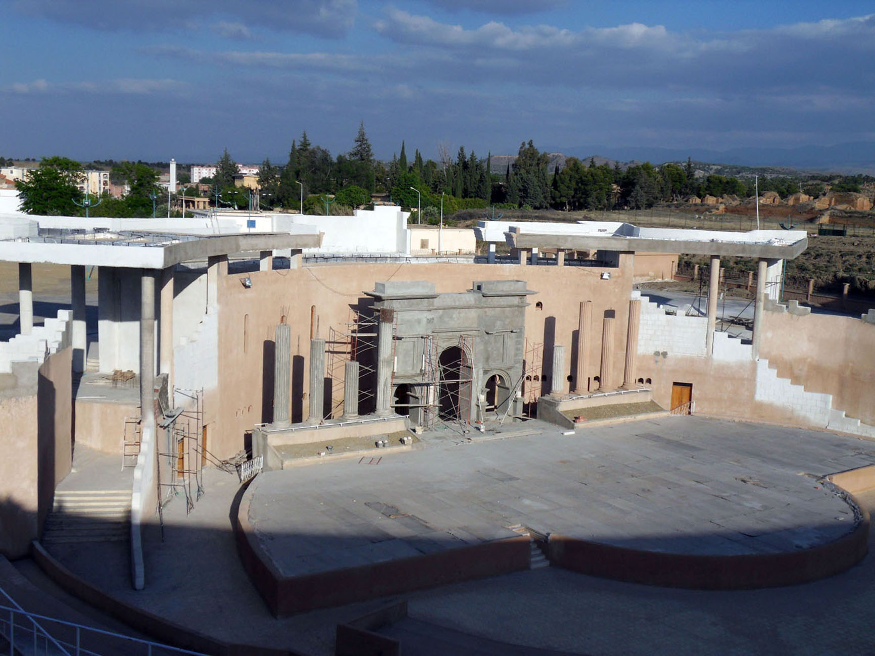 Une injure au site romain magnifique qui est là, à côté et au-dessous de ce pitoyable théâtre! Un frons scaenae en béton, il fallait y "penser".